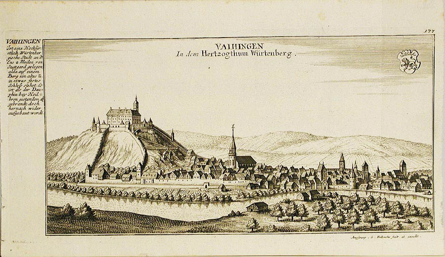 Vaihingen / In dem Hertzogthum Würtenberg, Kupferstich bei Gabriel Bodenehr, Augsburg um 1720